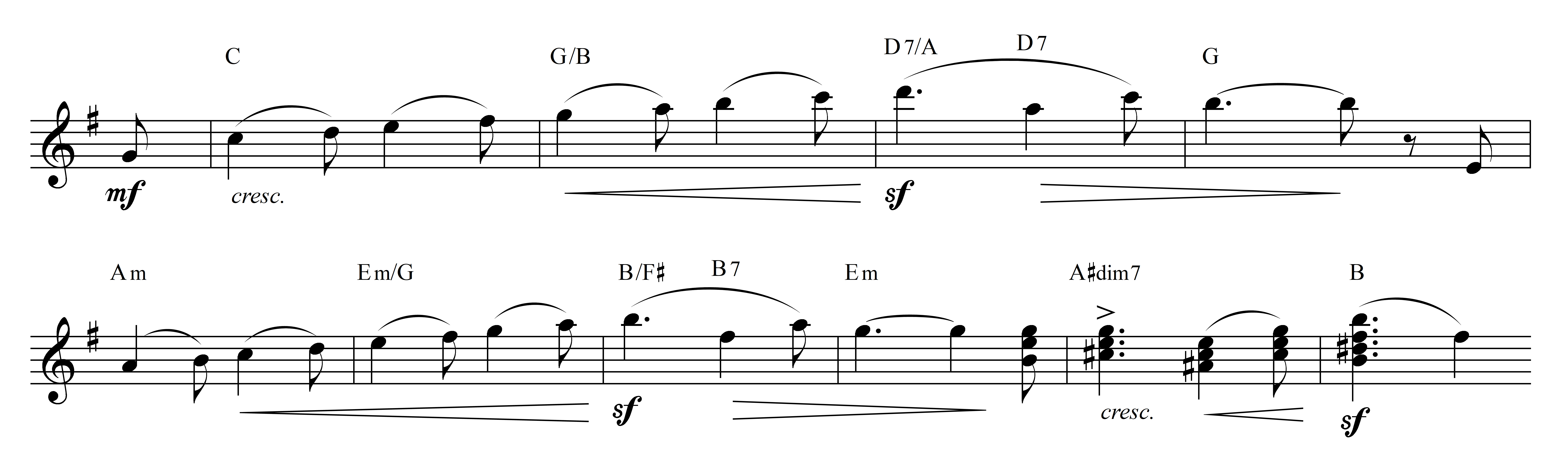 Notenbeispiel Smetana Die Moldau Hauptthema Mittelteil harmonisiert T. 56-65